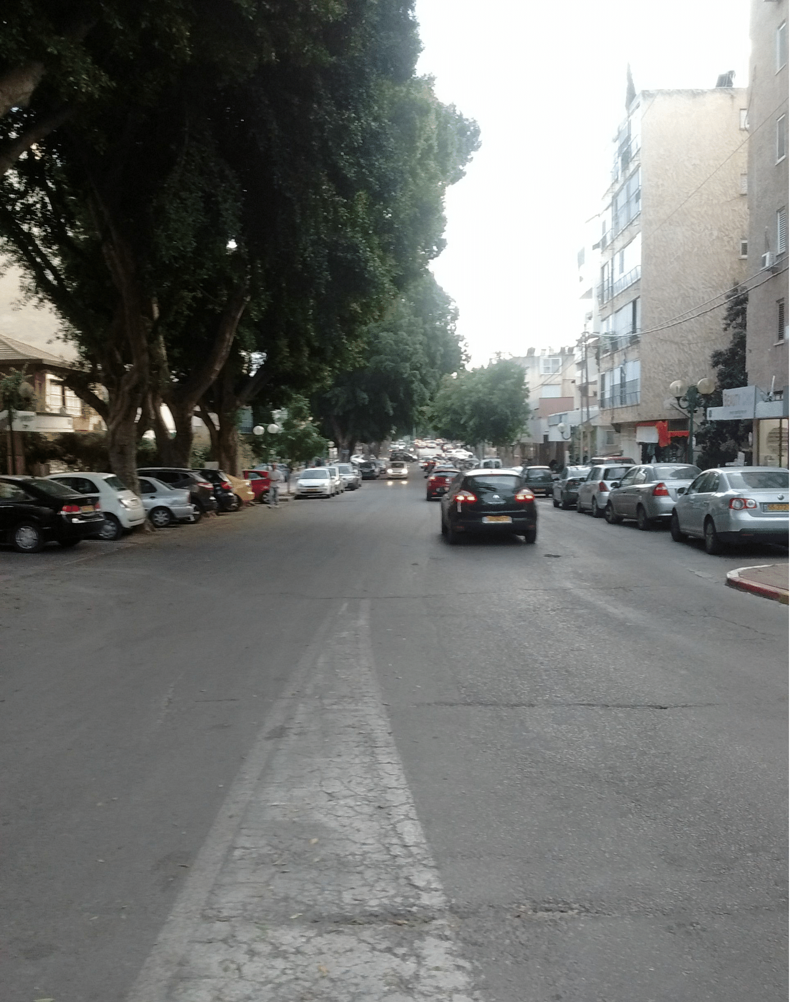 רחוב רוטשילד בכפר סבא 2016